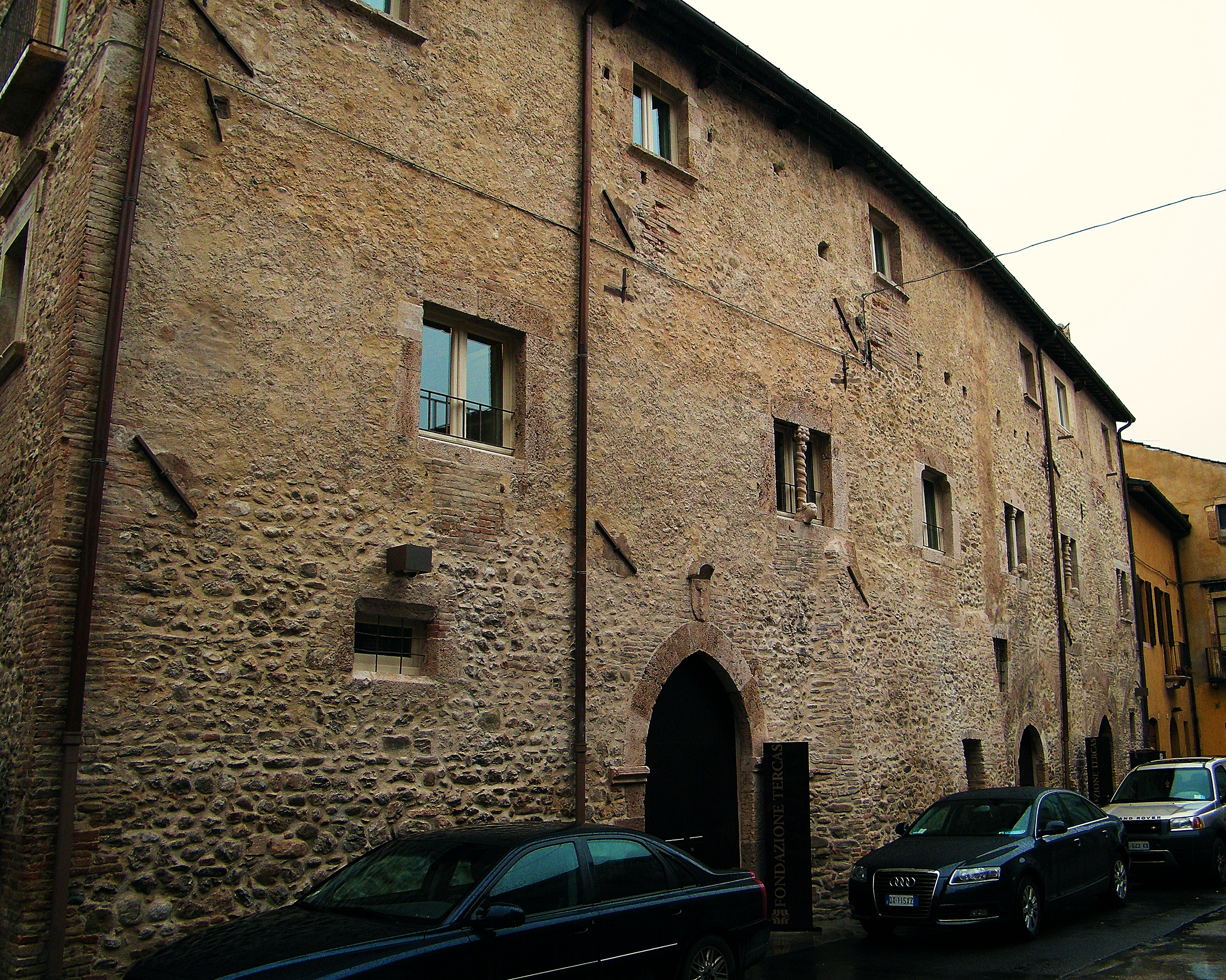 Il medievale Palazzo dei Melatino